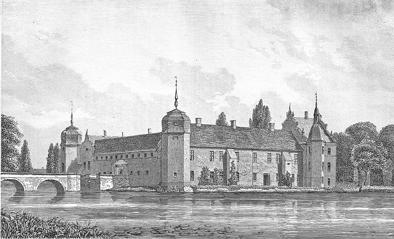 Løvenborg er en gammel gård, dens historie går tilbage til Absalon. Gården ligger i Butterup Sogn, Merløse Herred, Holbæk Kommune.